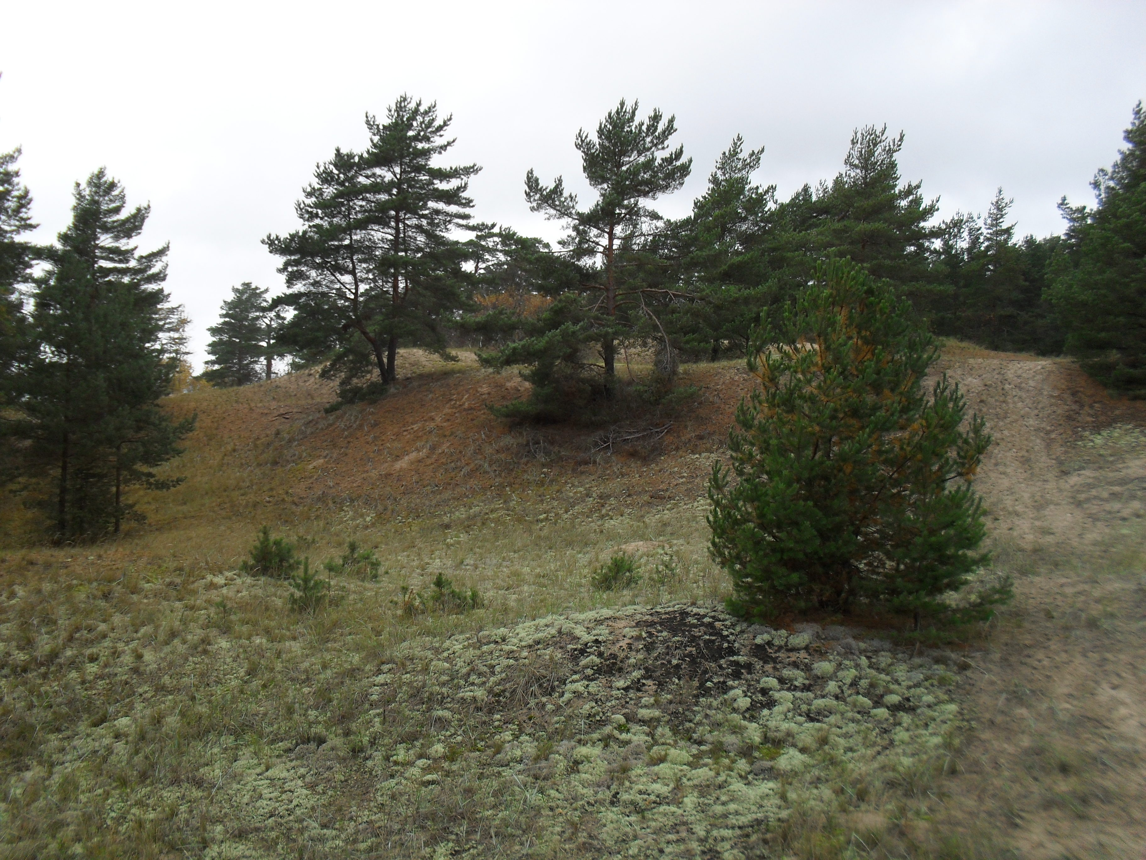 Kaitsealune luitemets Peipsi rannikul Smolnitsa maastikukaitsealal Ida-Virumaal Alajõe vallas.